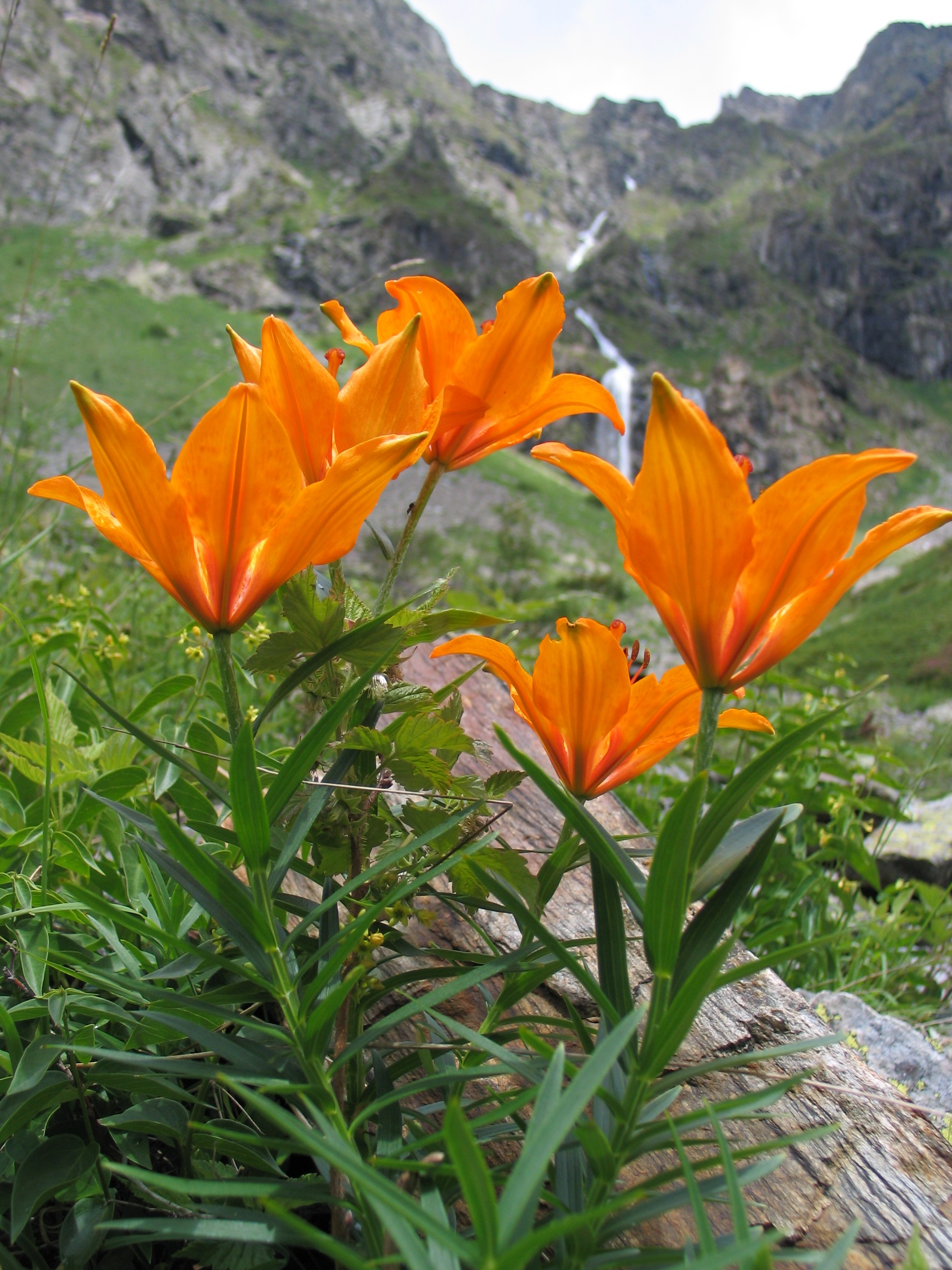 Lilium bulbiferum in Alpine habitat (Spain)